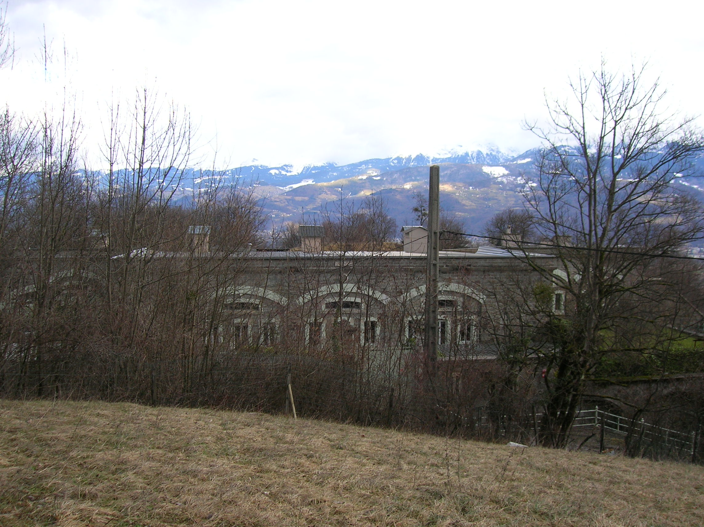 Fort Bourcet, Corenc, Isère, Rhone-Alpes, France.